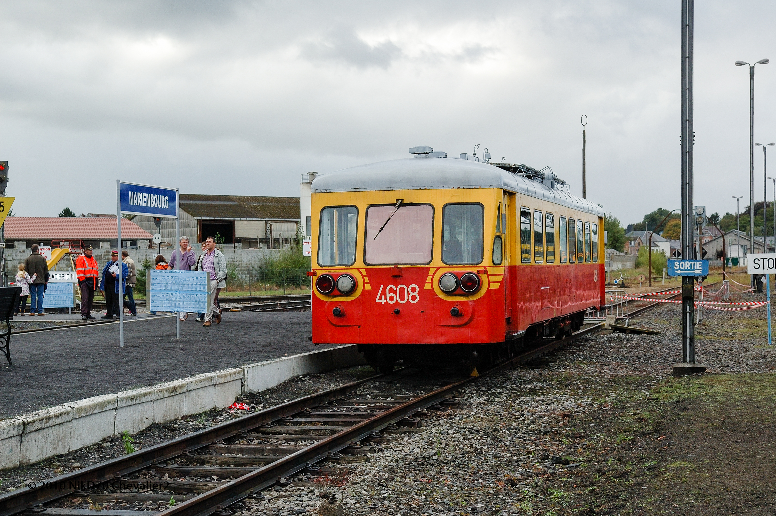 AUTORAIL 4608 du CFV3V